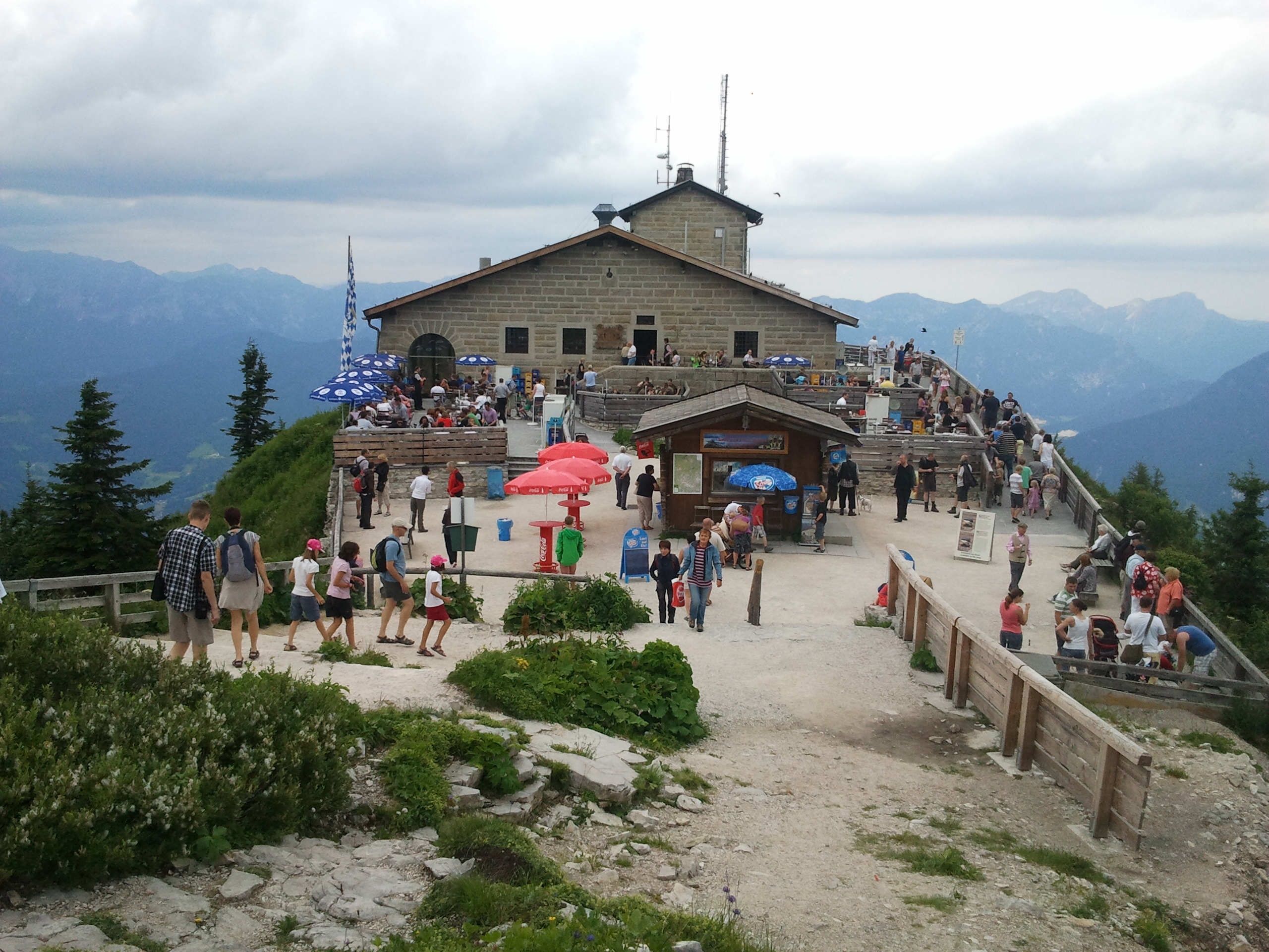 83471 Berchtesgaden, Germany